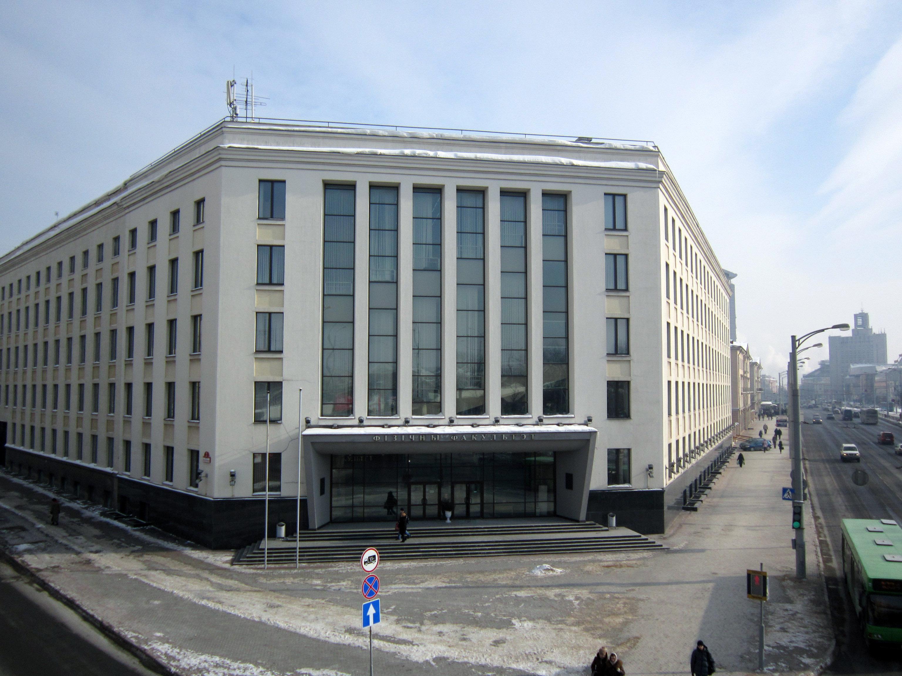 Физический факультет Белорусского государственного университета